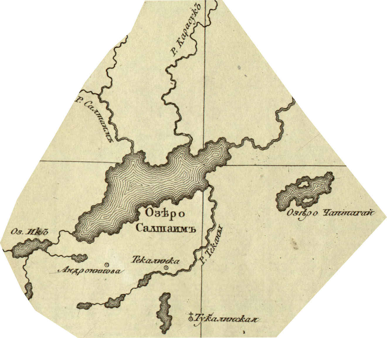 Карта течения реки Иртыша от Омской крепости до Тобольска. Сочинена при Императорской Академии Наук И.И. Исленьевым в 1780 г. Масштаб: в 1 дюйме 10 верст. Обозначены Тукалинская, озера Ик и Салтаим.